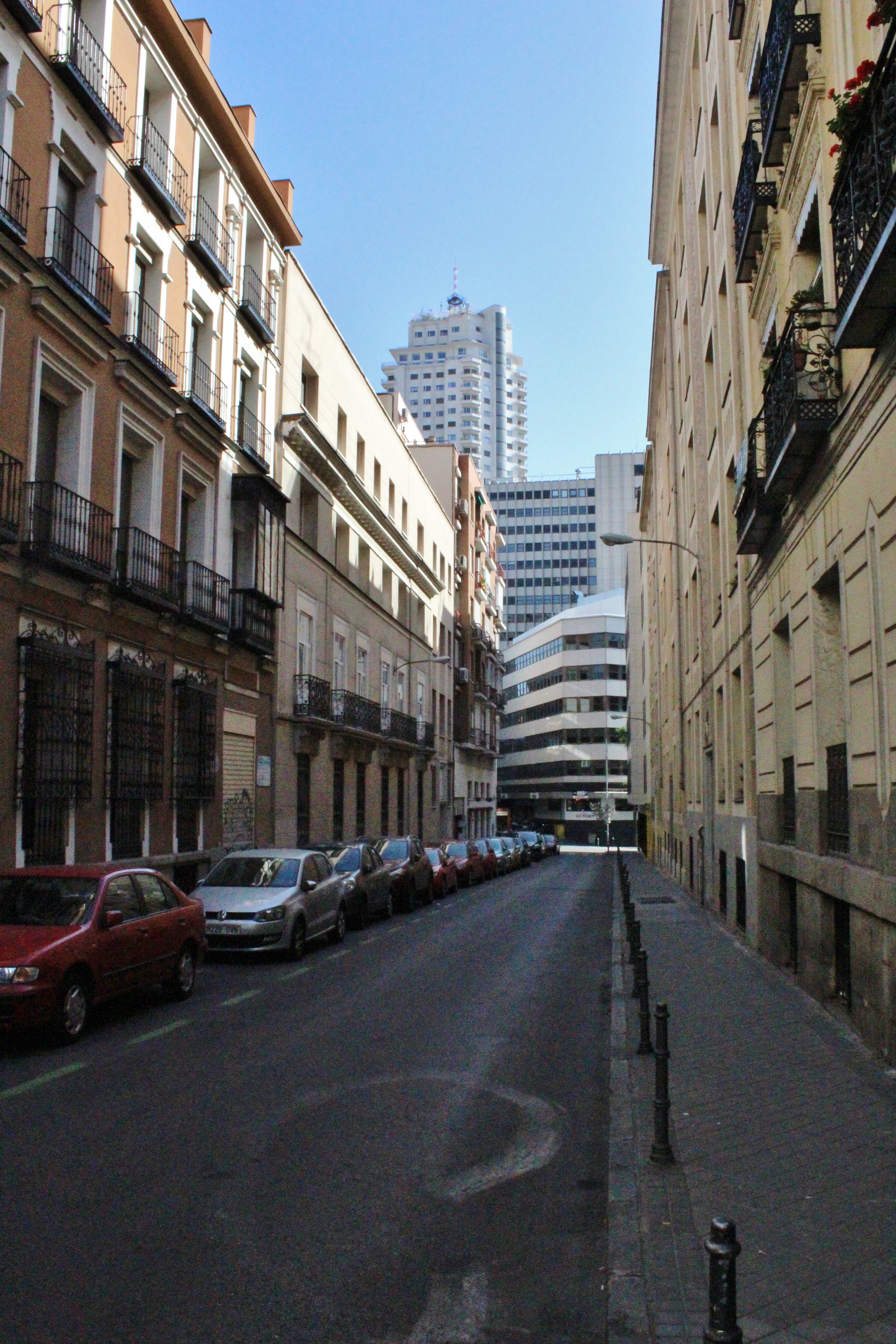 Calle del Tutor, Madrid.